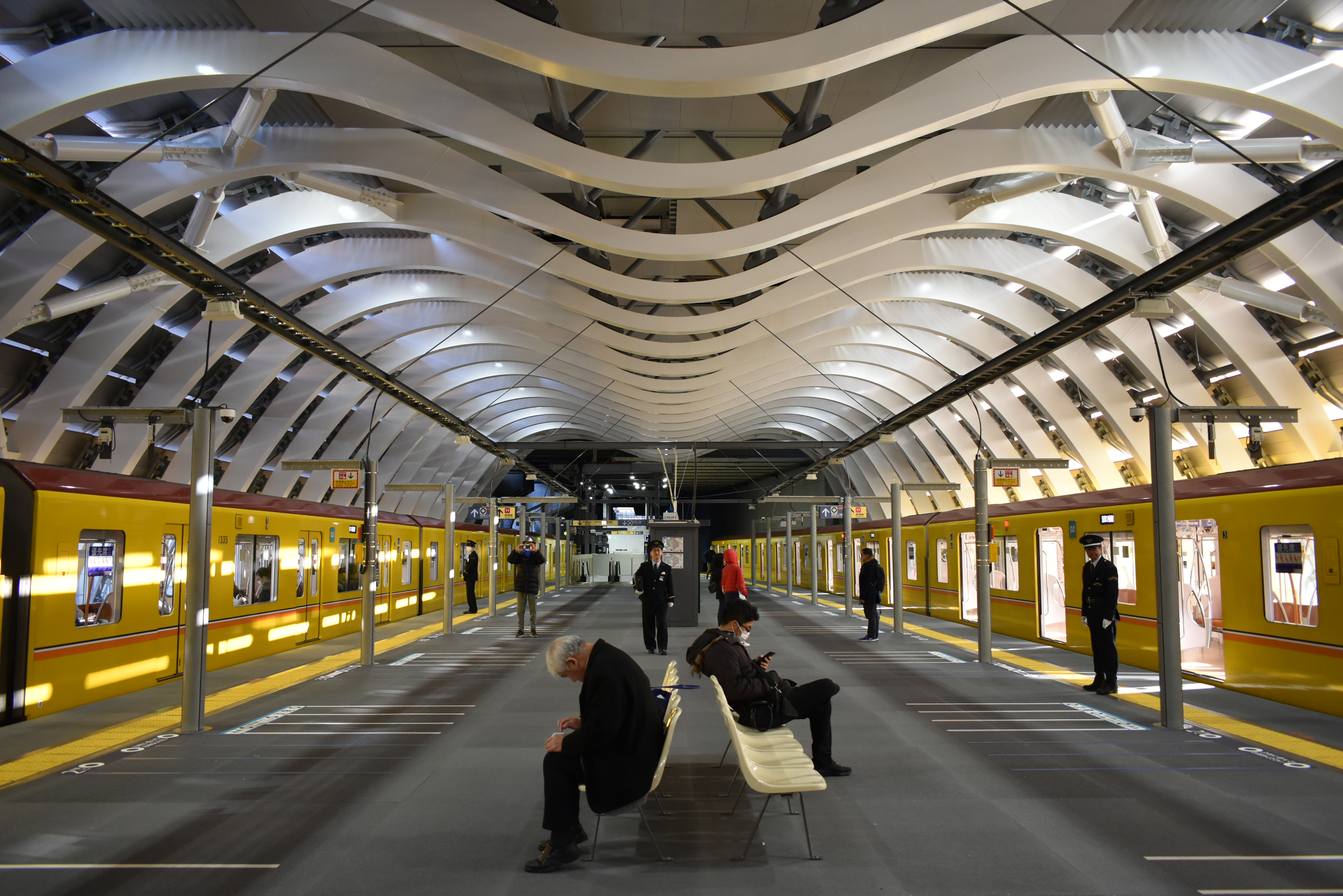 東京メトロ銀座線 渋谷駅